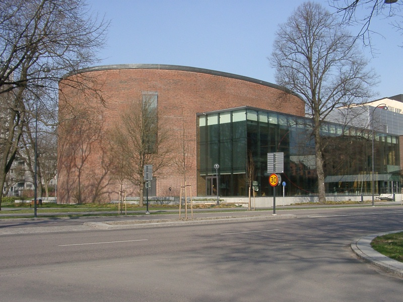 Västerås Konserthus Foto: sv::Användare:Chrizz